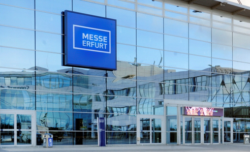 Die Messehalle 1 der Messe Erfurt (Thüringen).